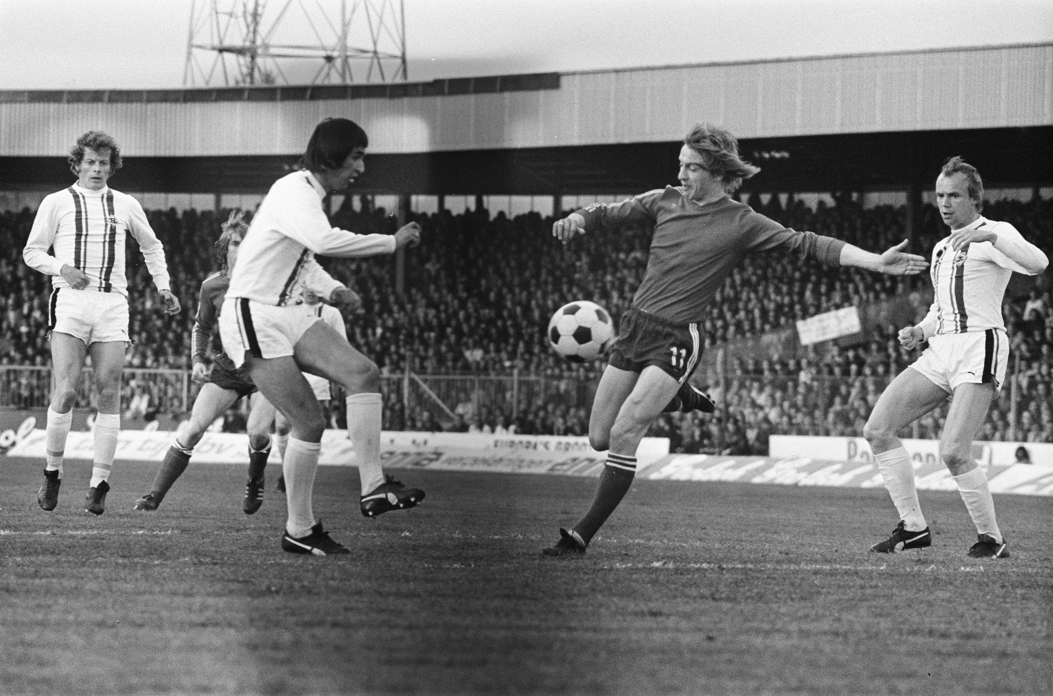 Collectie / Archief : Fotocollectie Anefo Reportage / Serie : FC Twente-Borussia Mönchengladbach 1-5 (returnwedstrijd finale Europa Cup 3) Beschrijving : Zuidema (FC Twente, nr. 11) in de aanval Datum : 21 mei 1975 Locatie : Enschede, Overijssel Trefwoorden : spelers, sport, voetbal Persoonsnaam : Zuidema, Johan Fotograaf : Hans Peters / Anefo Auteursrechthebbende : Nationaal Archief Materiaalsoort : Negatief (zwart/wit) Nummer archiefinventaris : bekijk toegang 2.24.01.05 Bestanddeelnummer : 927-9402